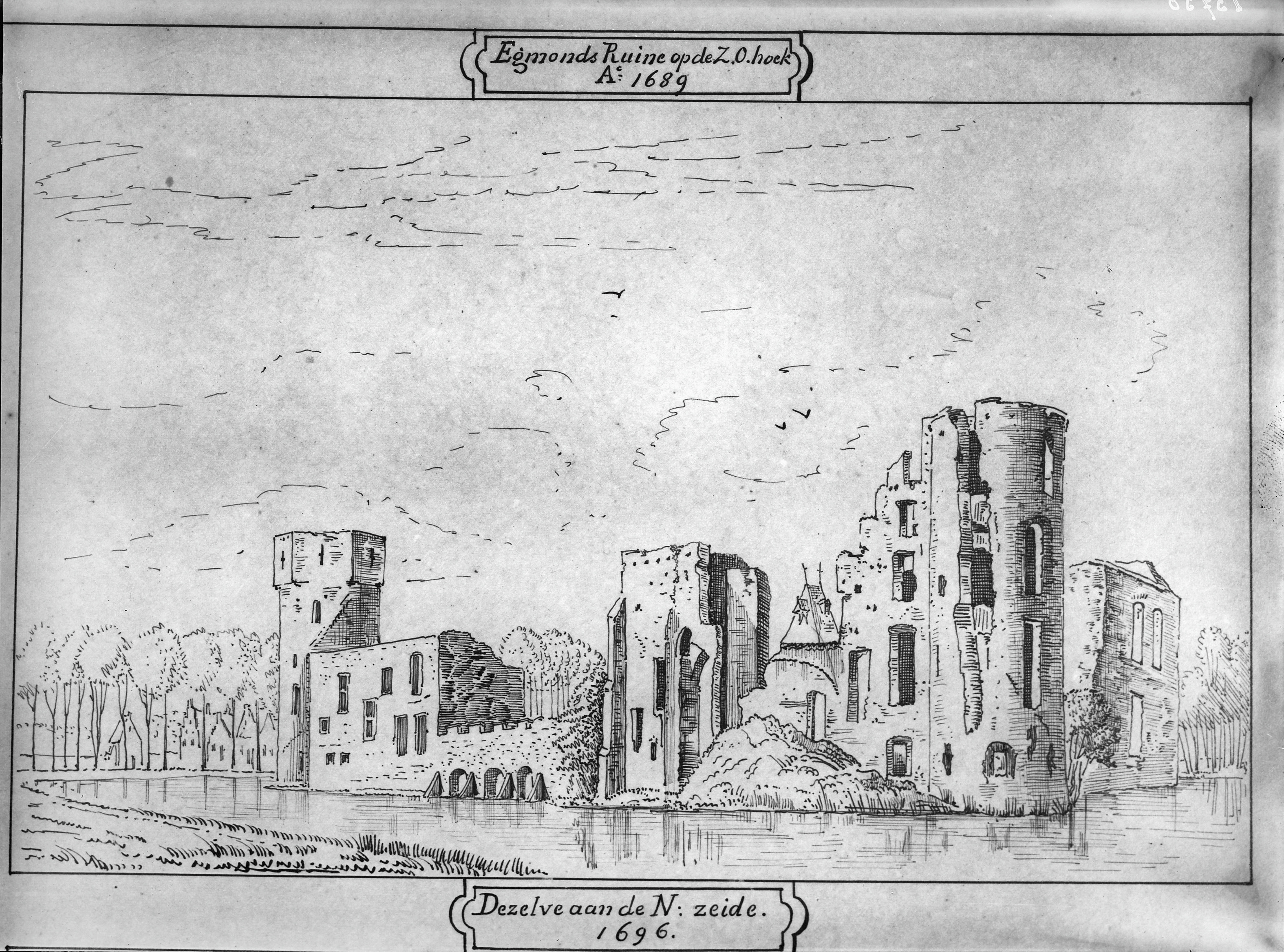 Kasteel: en ruïne naar copieen van oude tekening in de verzameling Rijksbureau Monumenten Zorg